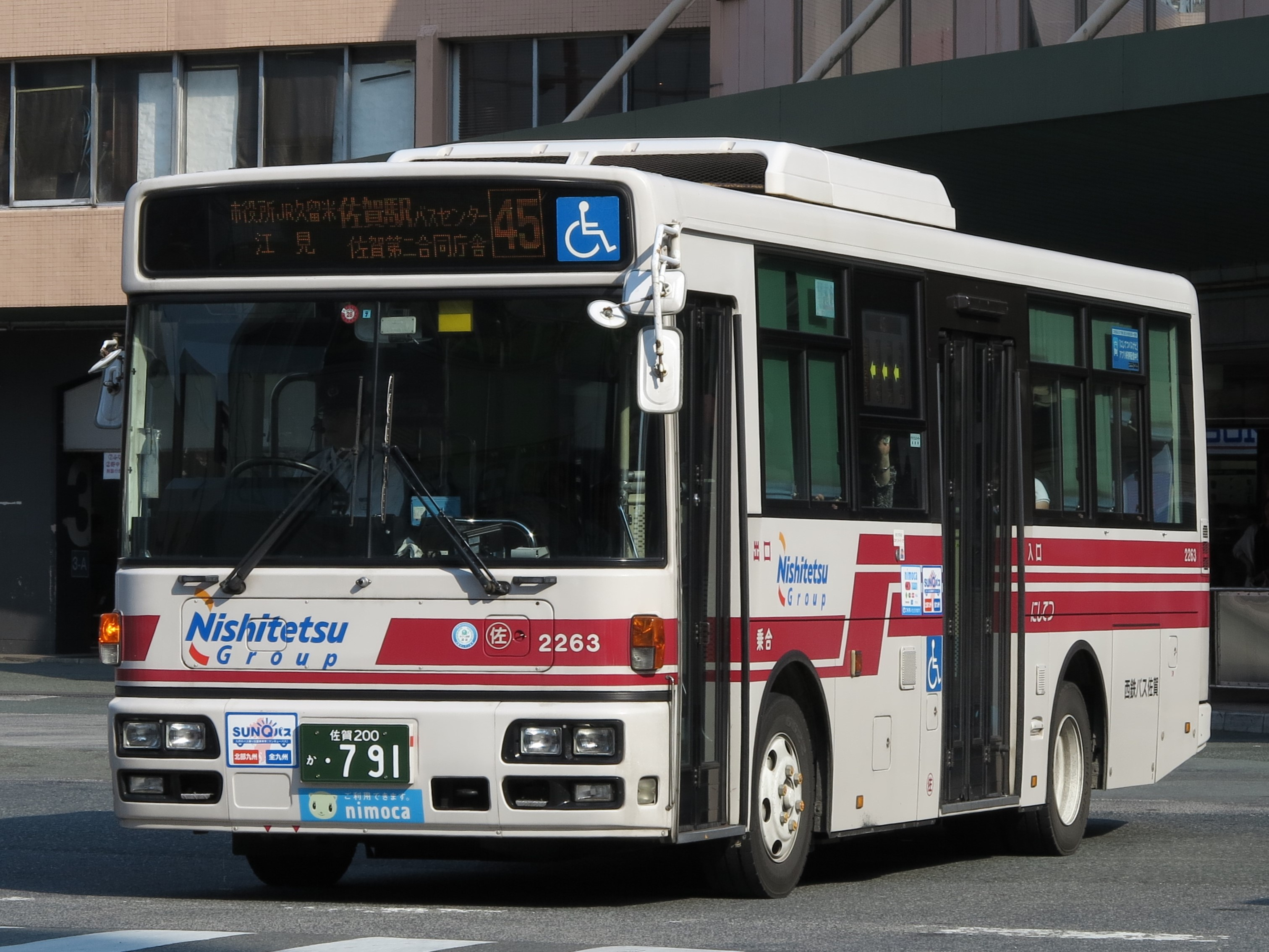 西鉄バス佐賀・本社所属の2263号車